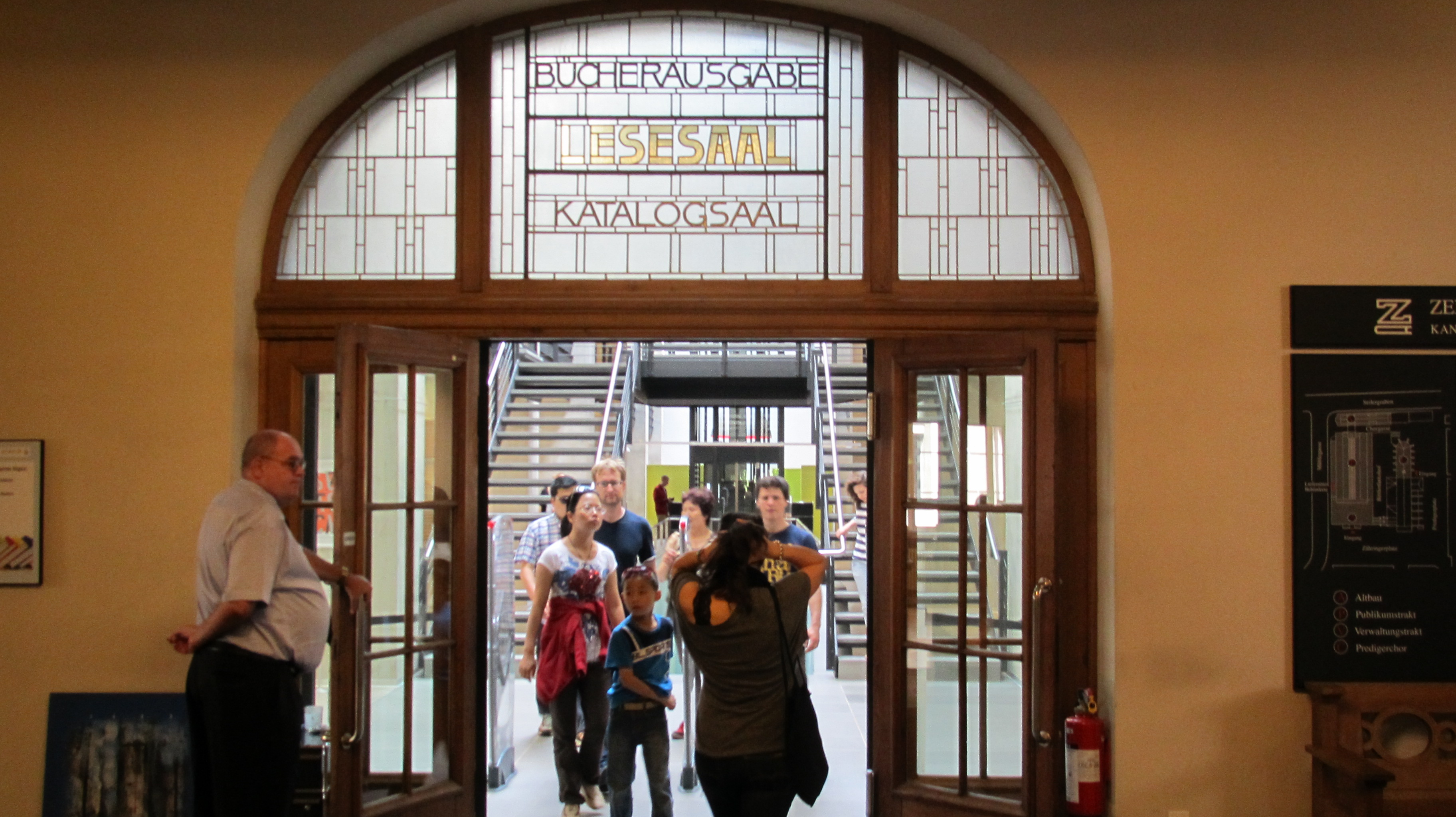 Zürich, Zentralbibliothek Zürich, Zähringerplatz 6